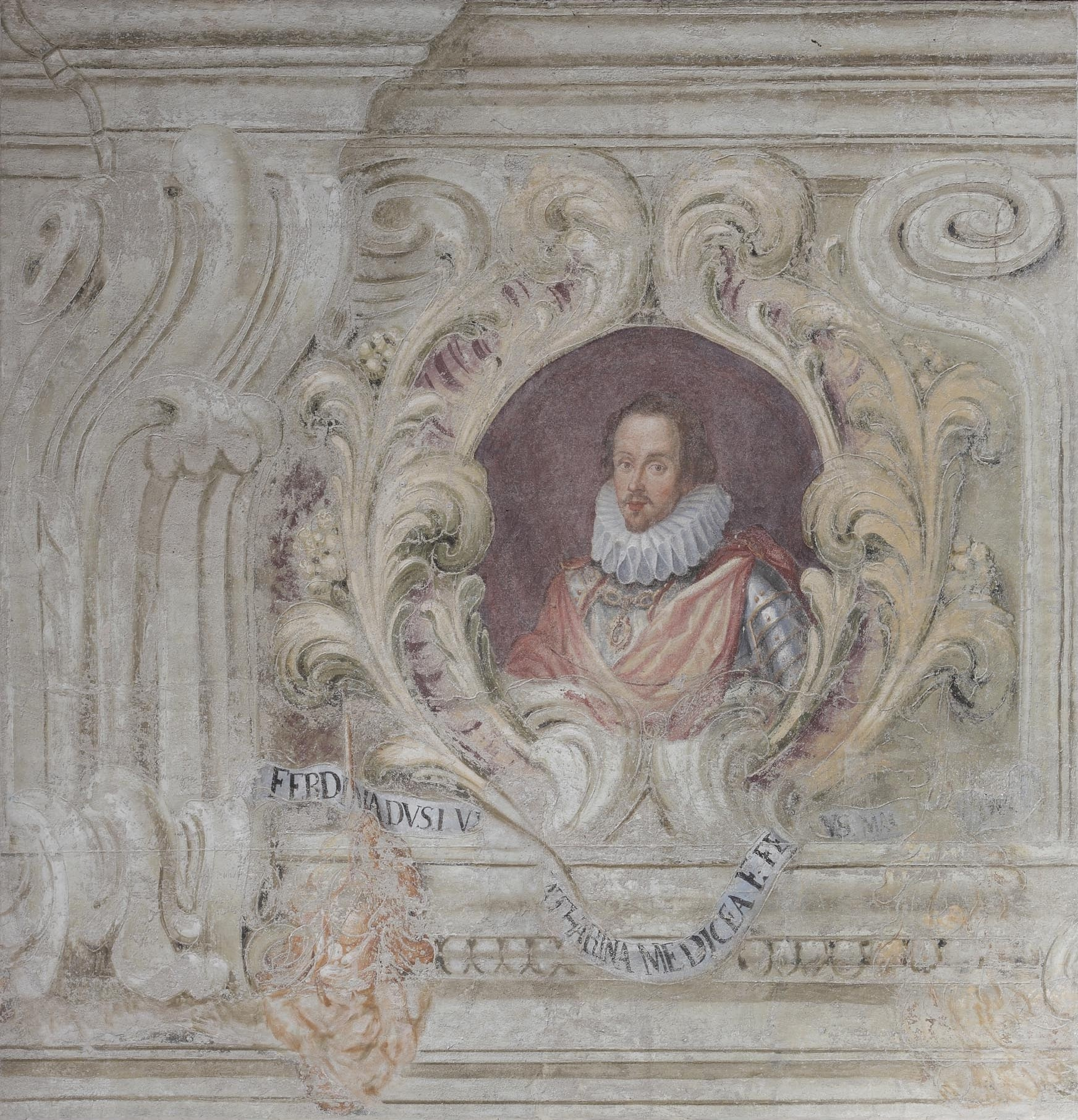 Ferdinando Gonzaga (1587-1626), figlio secondogenito di Vincenzo I, fu Duca di Mantova e del Monferrato dal 1612 al 1626. Ritratto di Ferdinando Gonzaga. Mantova, Palazzo Ducale